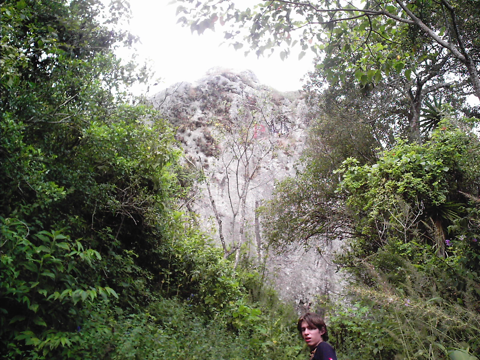 Un paseo que hice con un amigo a la Piedra de Aserri.